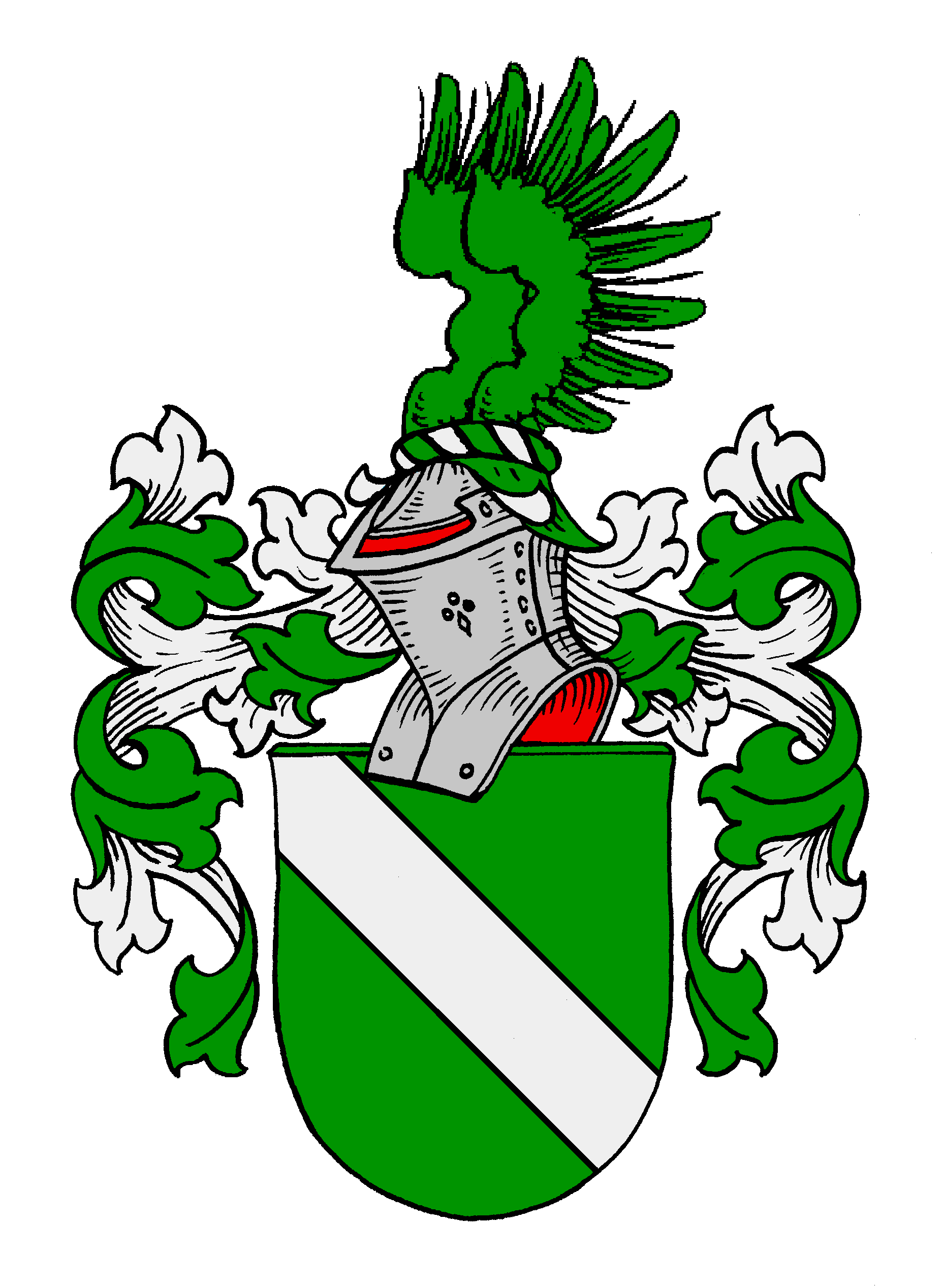 Stammwappen der oberfränkischen Senger, späteren Ritter und Edlen von Senger